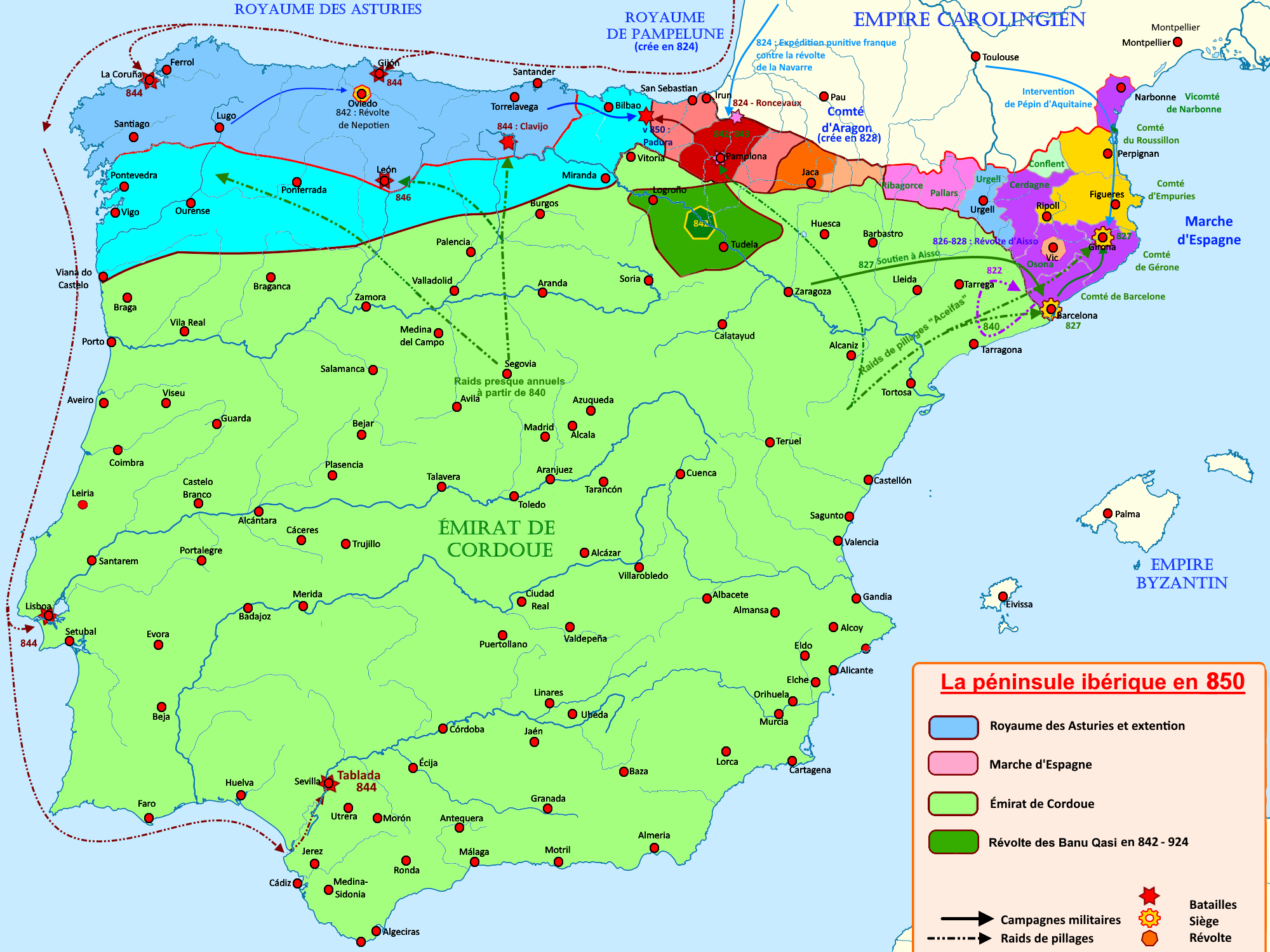 Carte de la péninsule ibérique de 814 à 850, montrant les principaux faits historiques de l'époque.